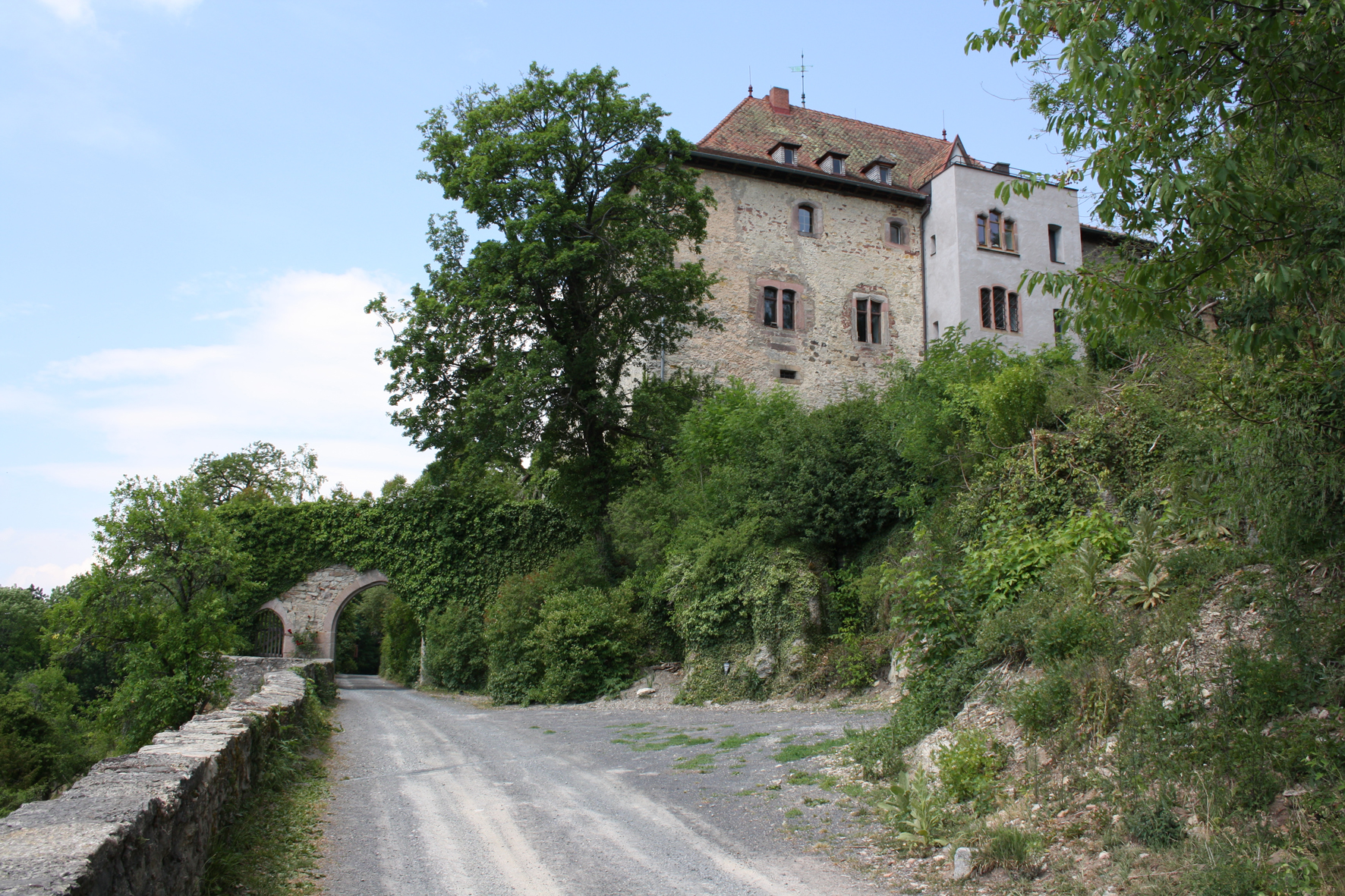 Äußeres Burgtor der Burg Brandenstein im hessischen Schlüchtern-Elm